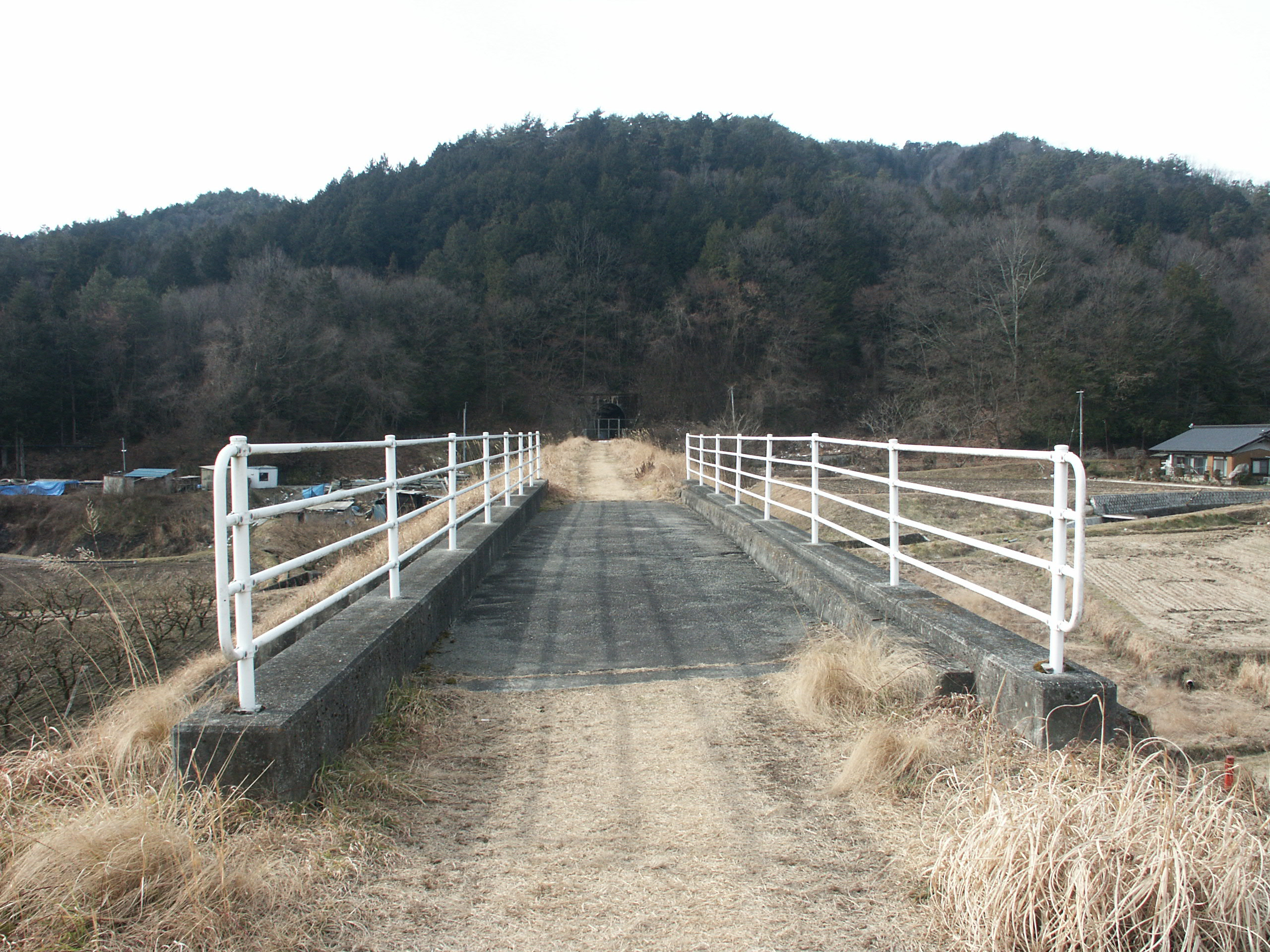 中津川線二ツ山トンネル北側坑口方向を撮影